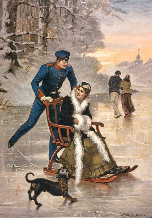 „Im Weihnachtsurlaub“ (Stuhlschlitten)